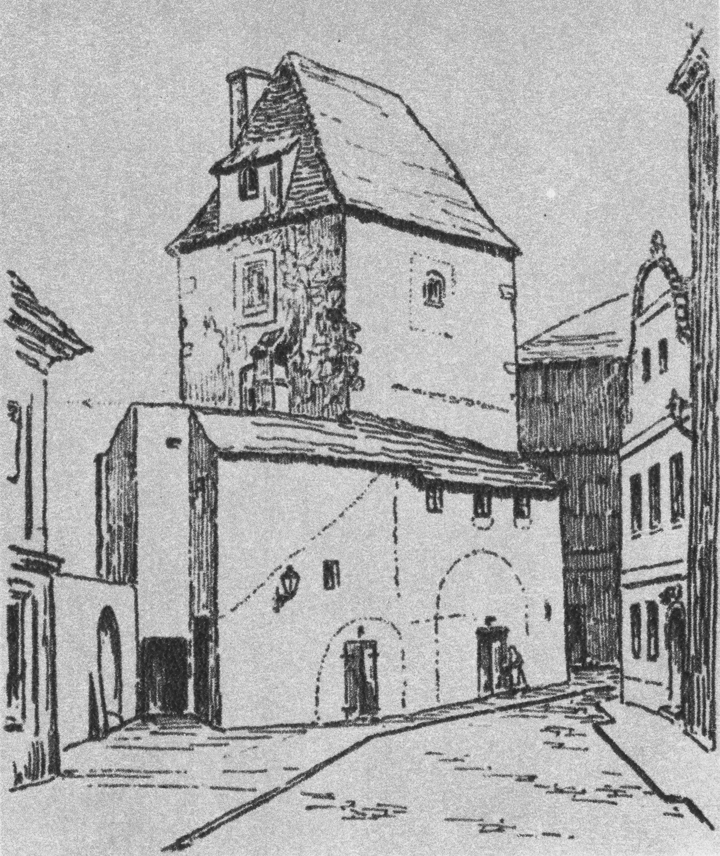 hradební věž Manda v Českých Budějovicích zbořená roku 1906